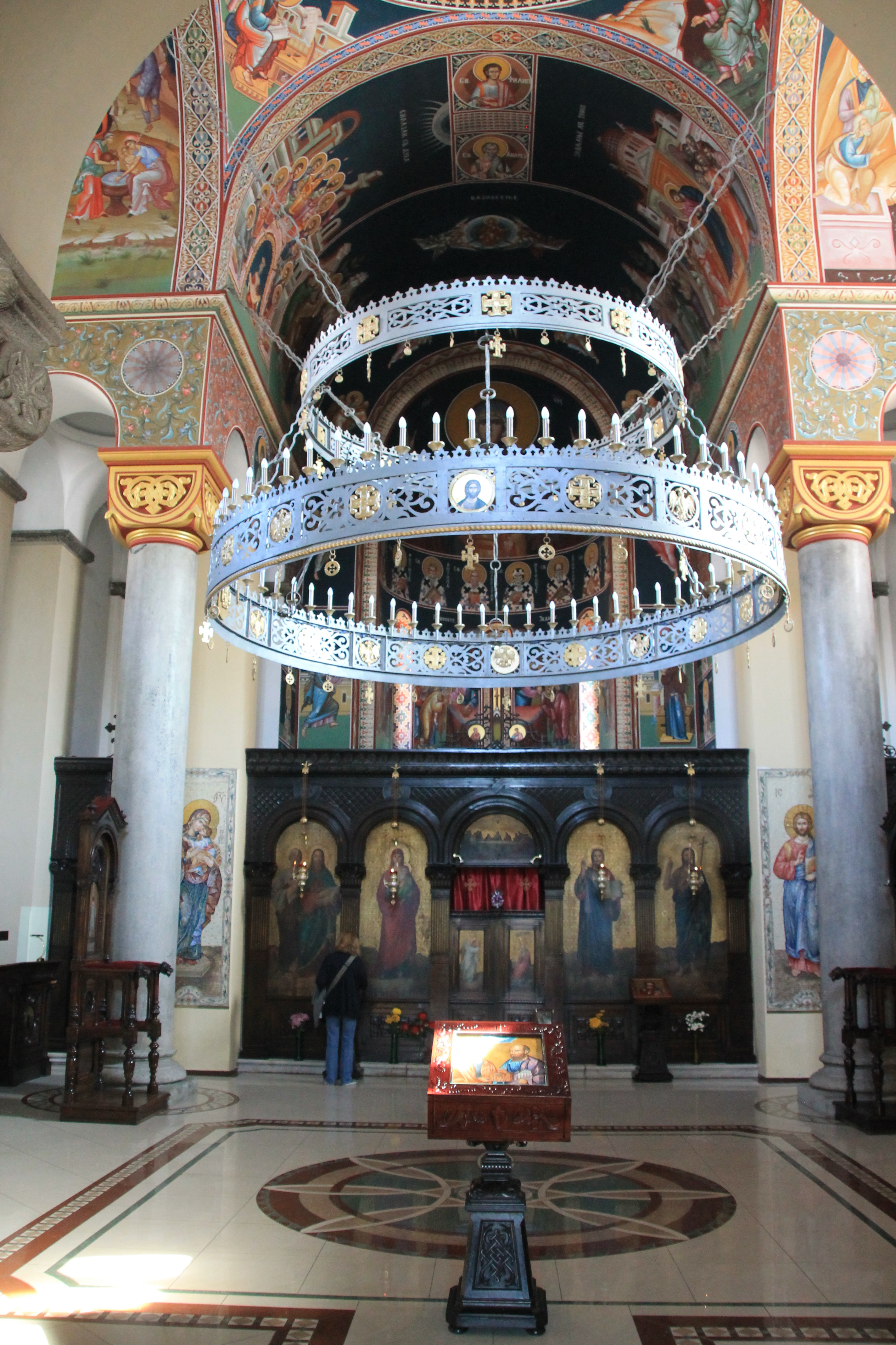 Church of St. Peter and Paul, Jagodina